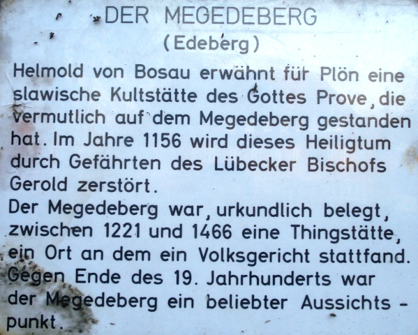 Informationtafel am Megedeberg in Plön